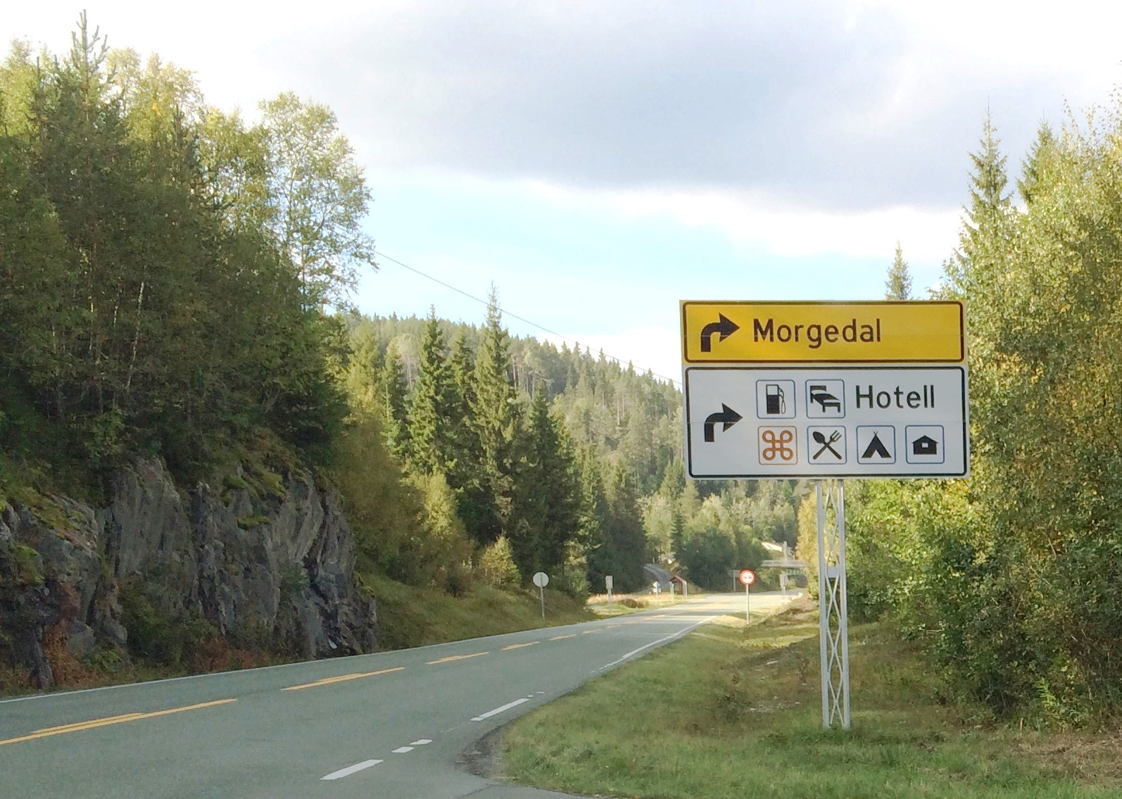 E134 ved Morgedal